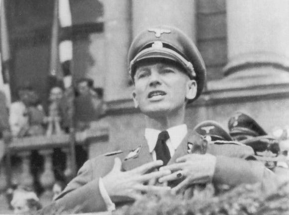 Парад рекрутів до СС Галичина у Львові